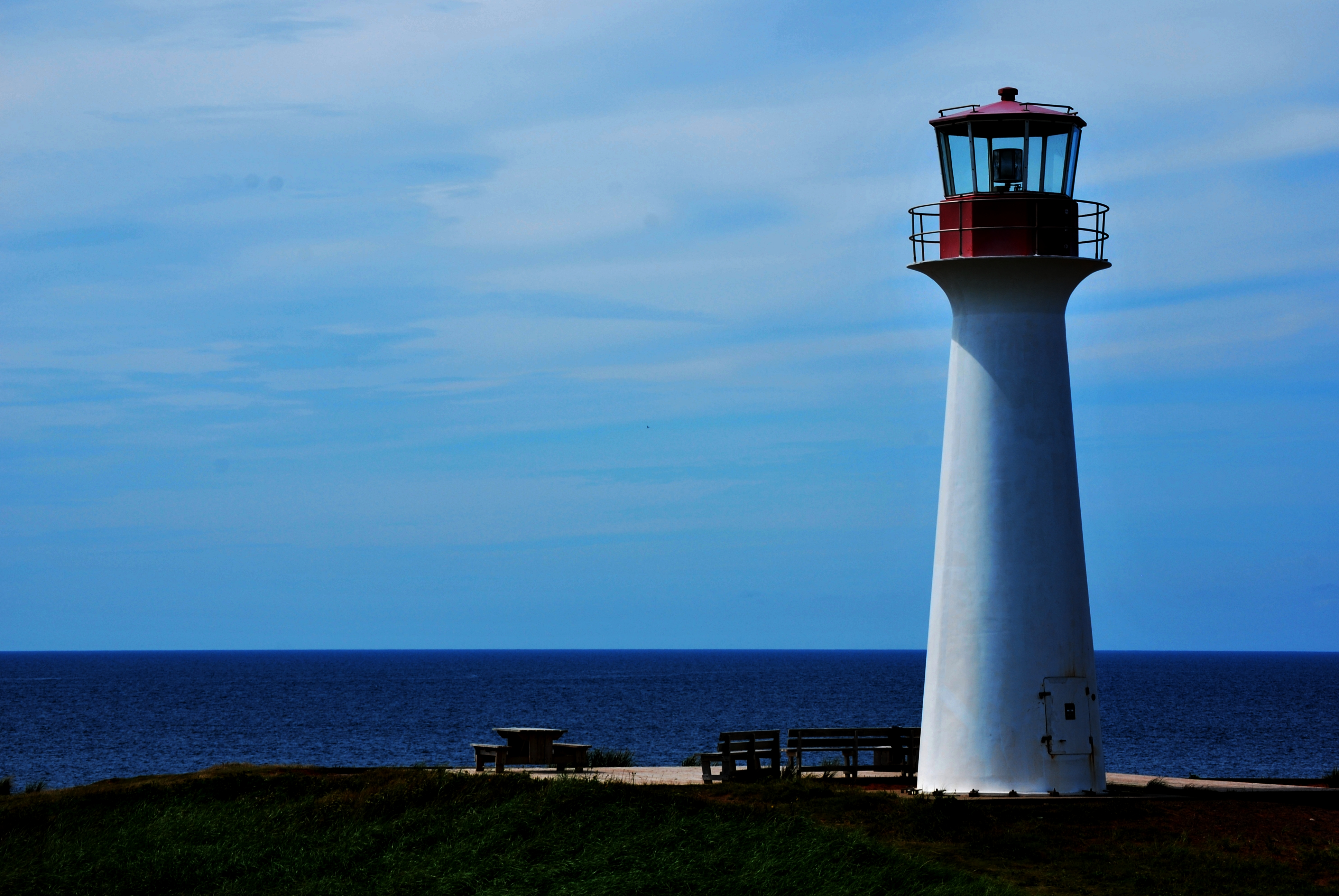 Phare de l'Étang-du-Nord